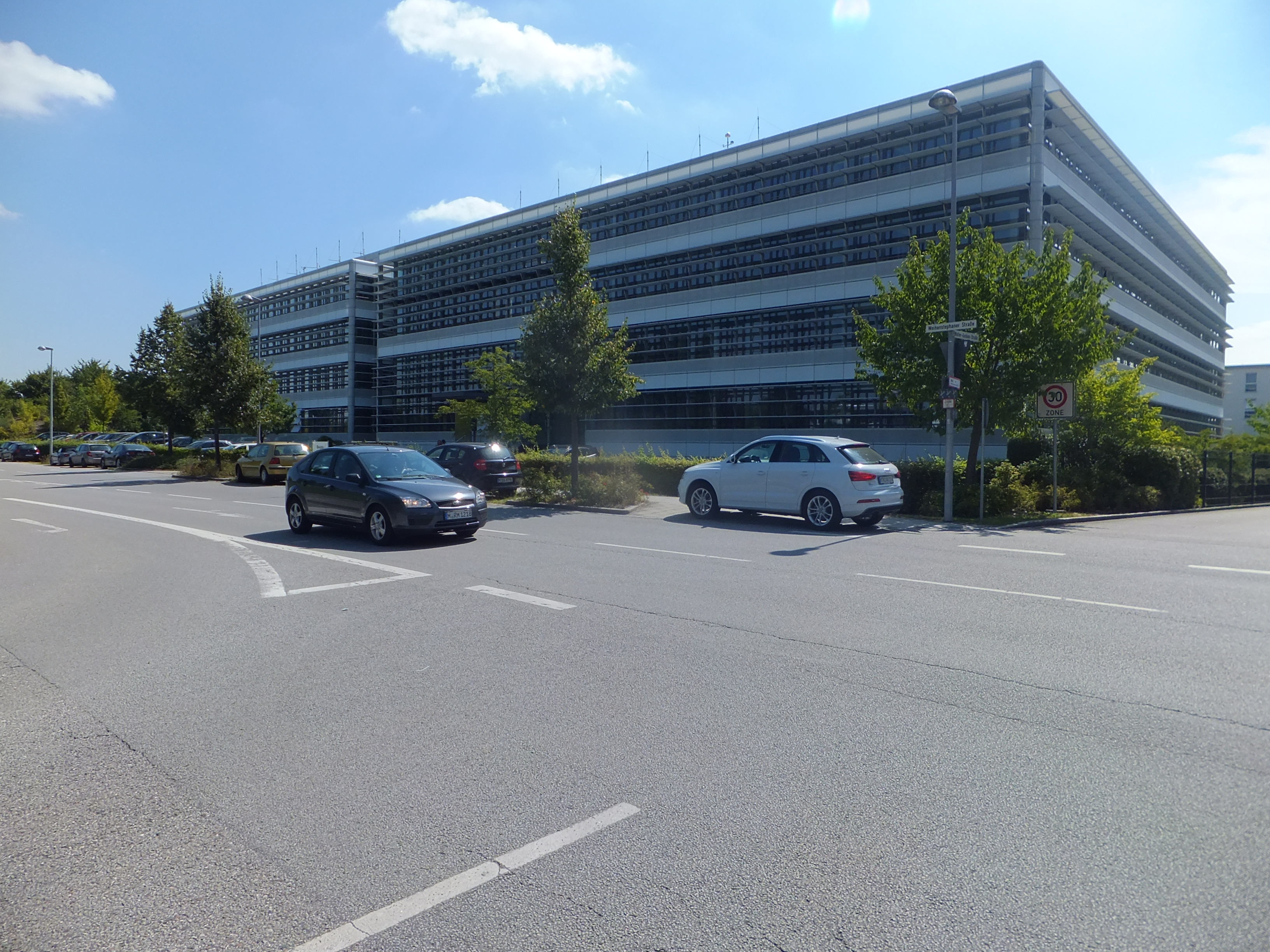 USH Nord - Baader Bank AG-Komplex